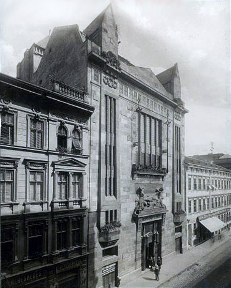 Budapest. Hungária fürdő (Kép: Szabó Ervin Könyvtár)